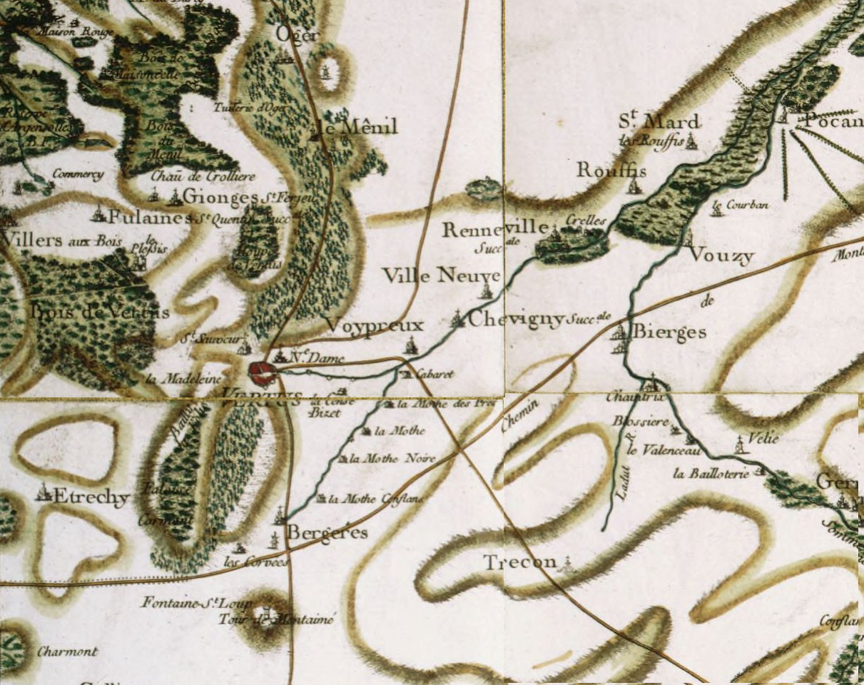 carte N°80 de Cassini